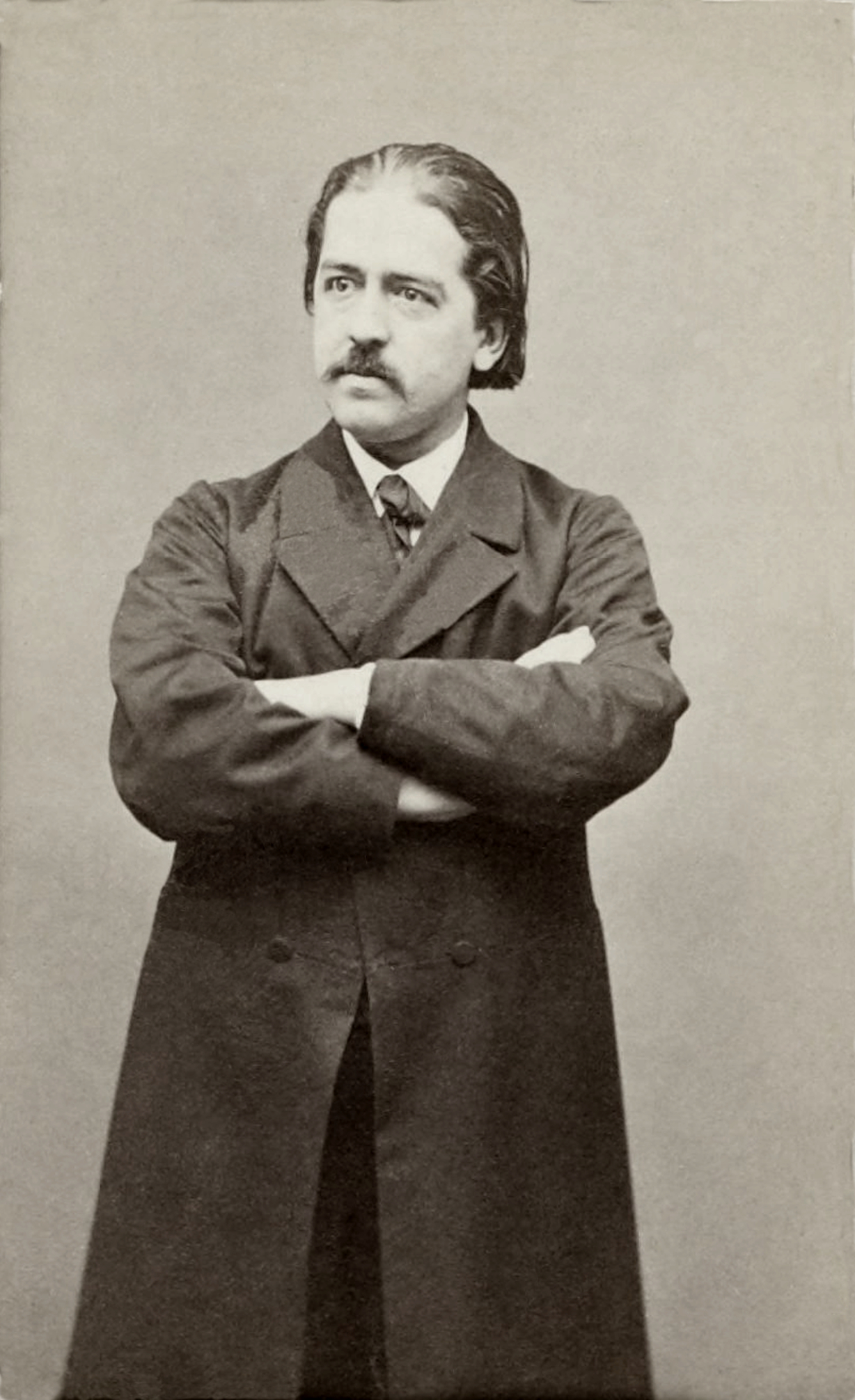 Charles-Louis Chassin (1831 - 1901), homme politique et historien français.